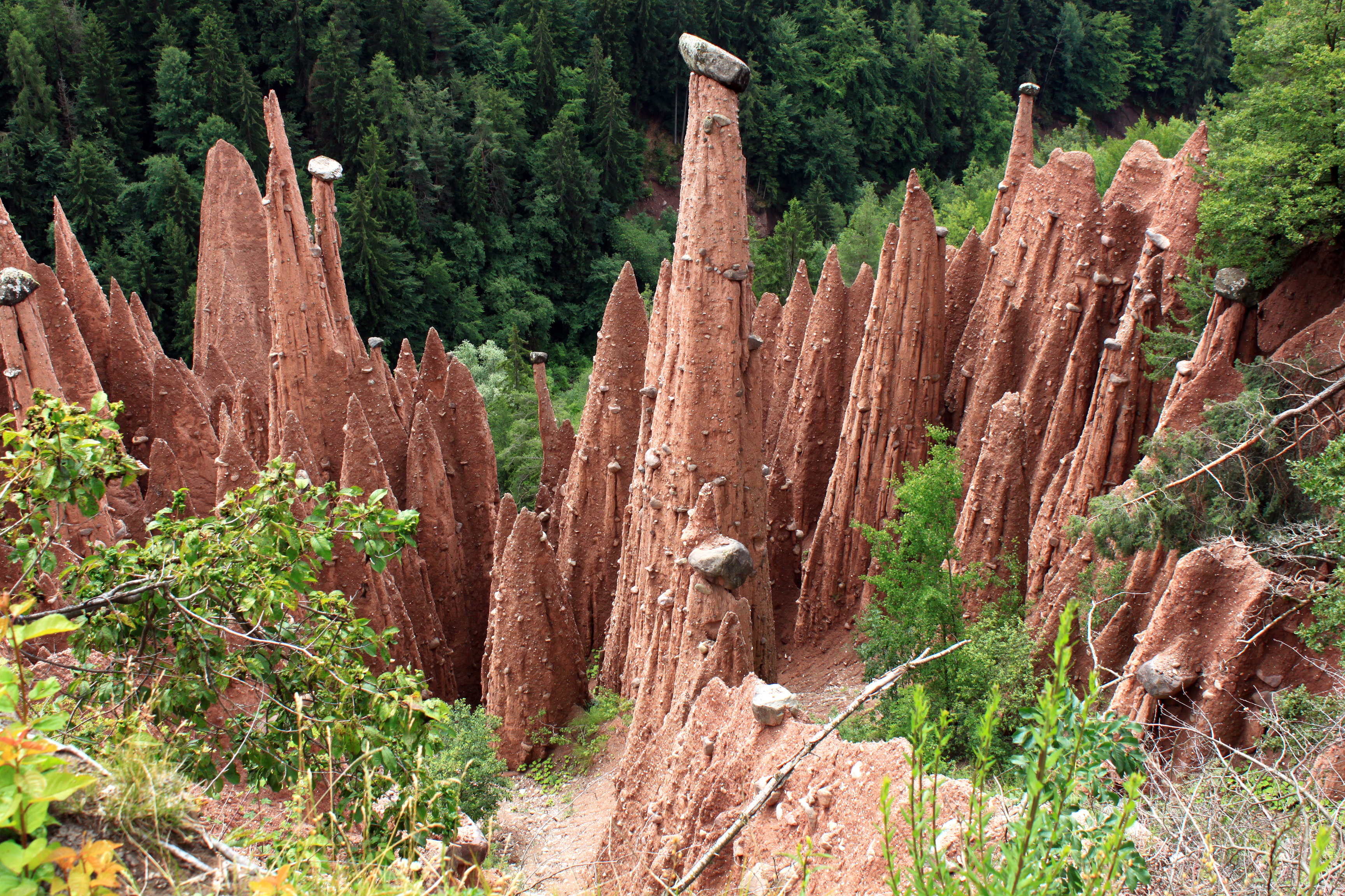 Beeindruckende natürliche Erdpyramiden zwischen Bozen und Oberbozen an den Hängen des Ritten in Südtirol.